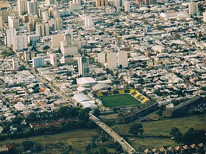 Estadio Roberto Natalio Carminatti desde el aire Club Olimpo